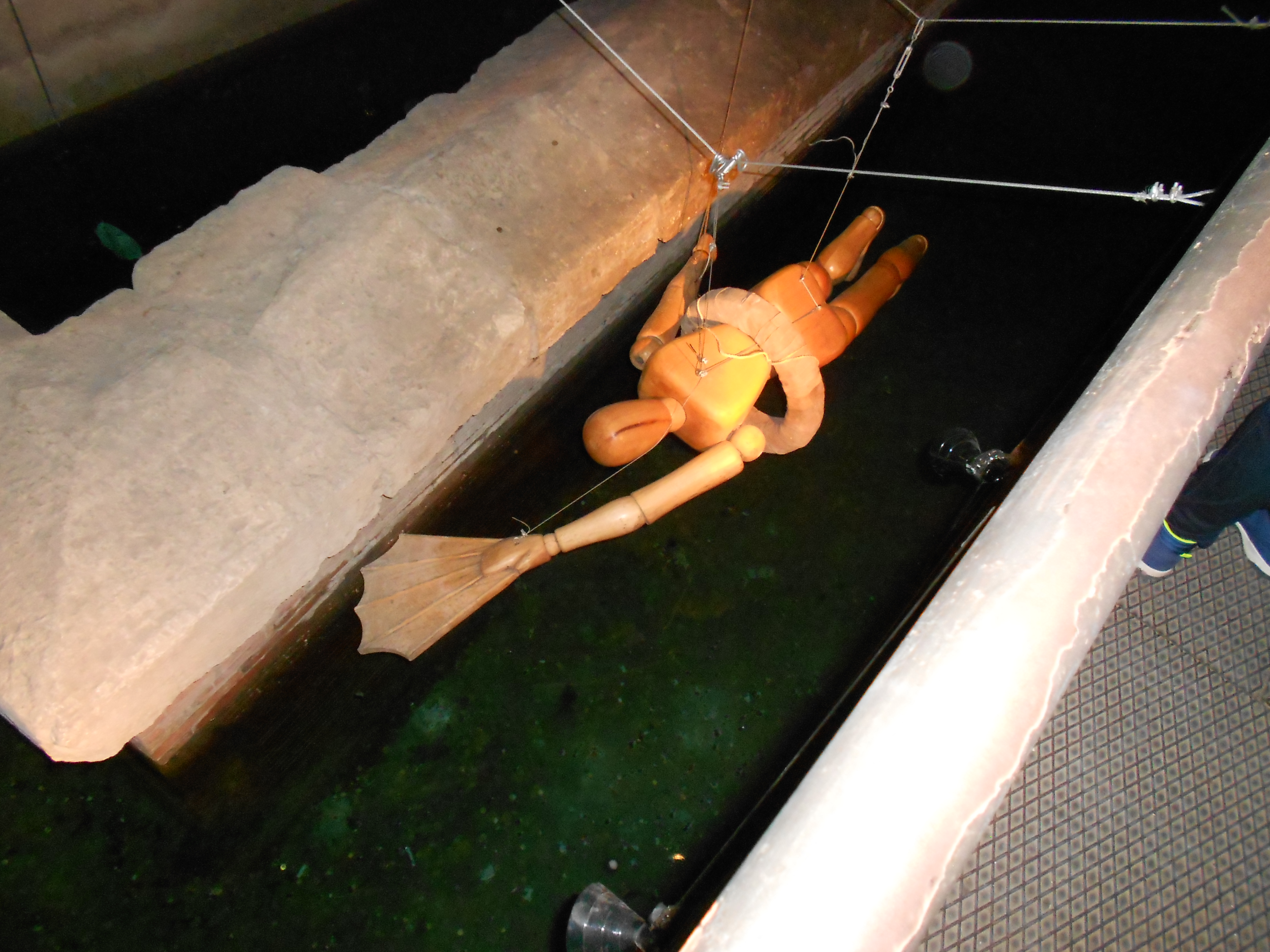 Flossenhandschuh, wie ihn Leonardo da Vinci skizzierte, aus der Ausstellung Leonardo da Vinci: il genio e le invenzioni, Palazzo della Cancelleria, Rom